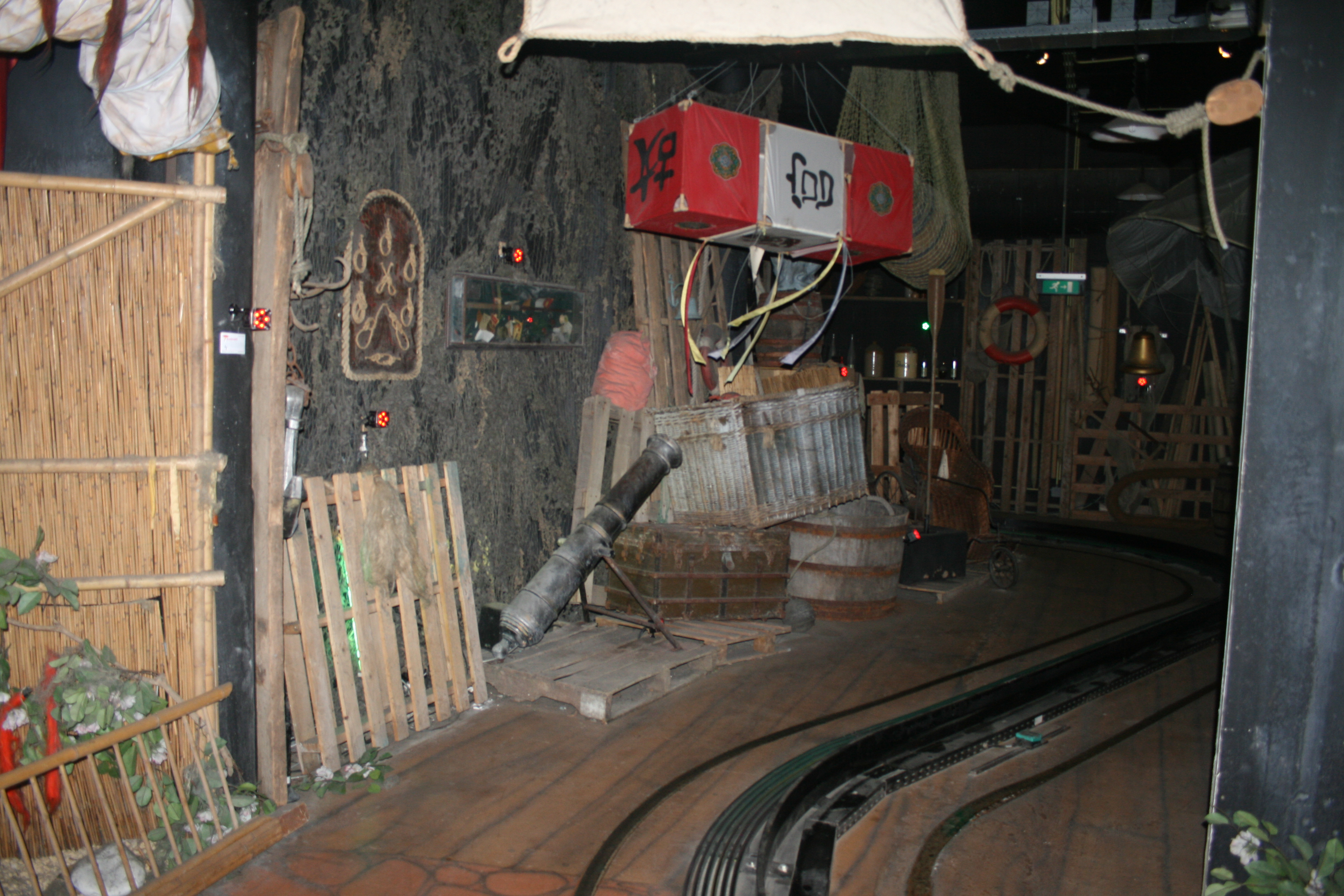 Interactieve darkride Discovery Club in Avonturenpark Hellendoorn.